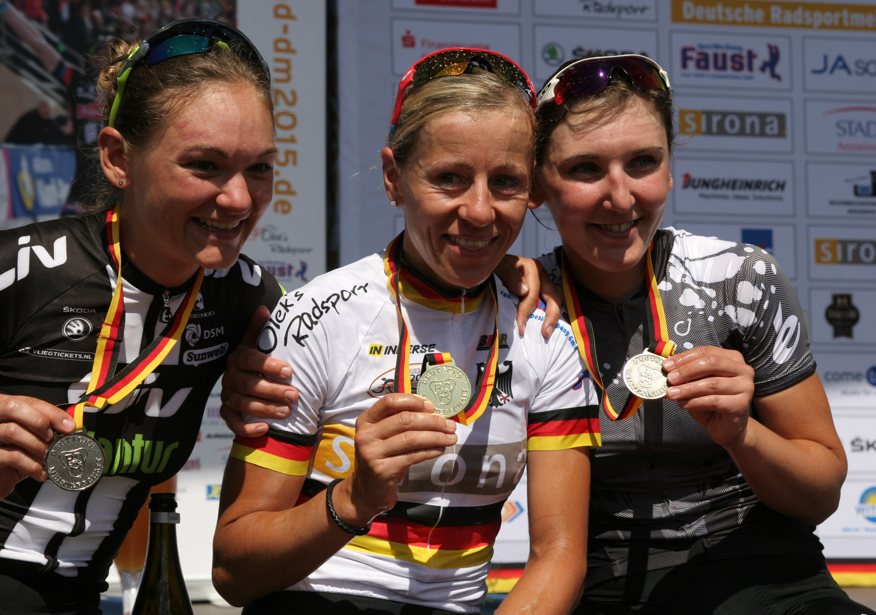 Claudia Lichtenberg, Trixi Worrack und Lisa Brennauer bei der Siegerehrung (v.l.n.r.). Es läuft die Nationalhymne. Foto von den Deutschen Meisterschaften im Straßenrennen der Frauen (Elite) am 28. Juni 2015 in Bensheim (Hessen)